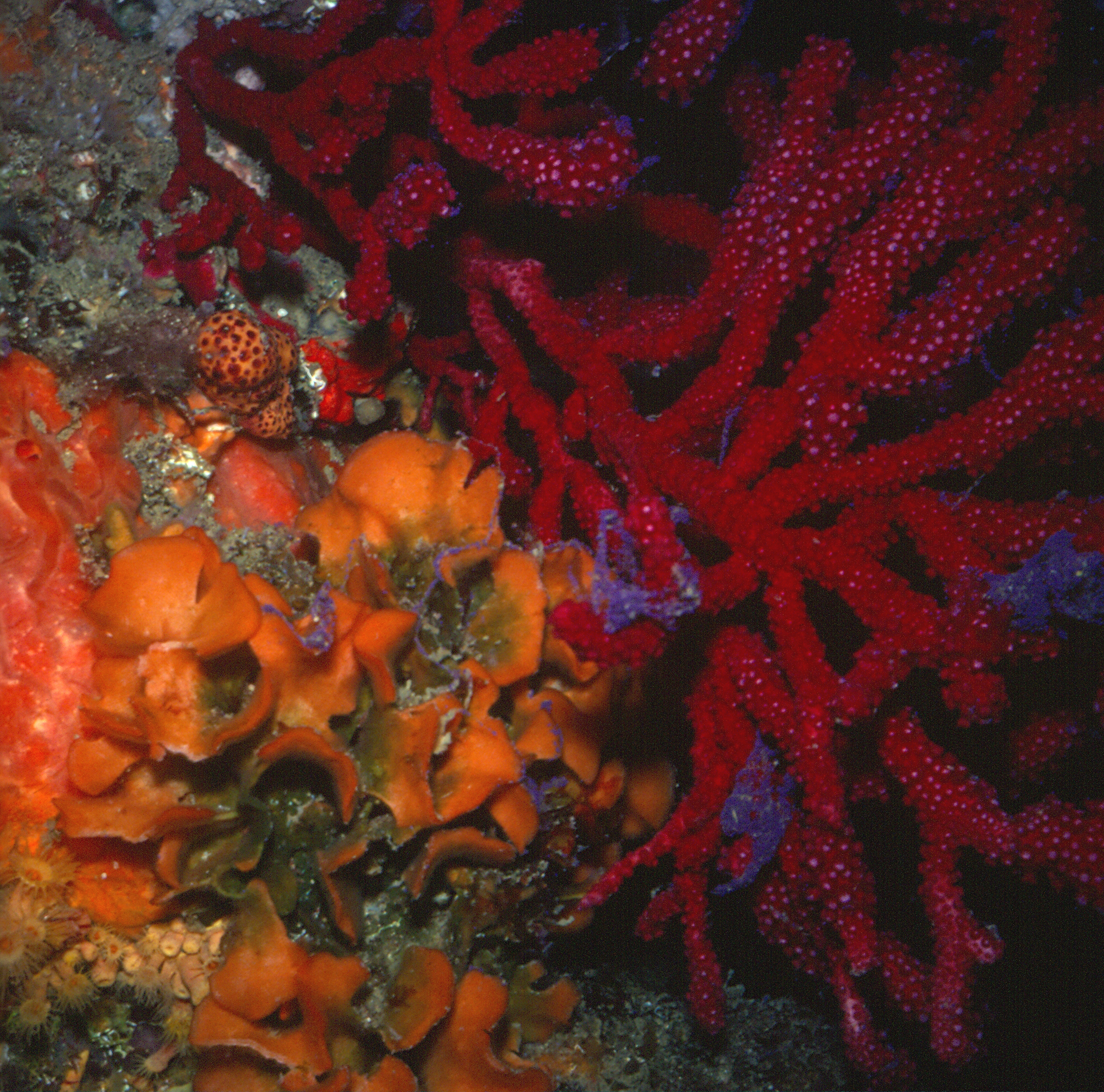 Colonies de Pentapora foliacea, d' Alcyonium acaule et de Paramuricea clavata